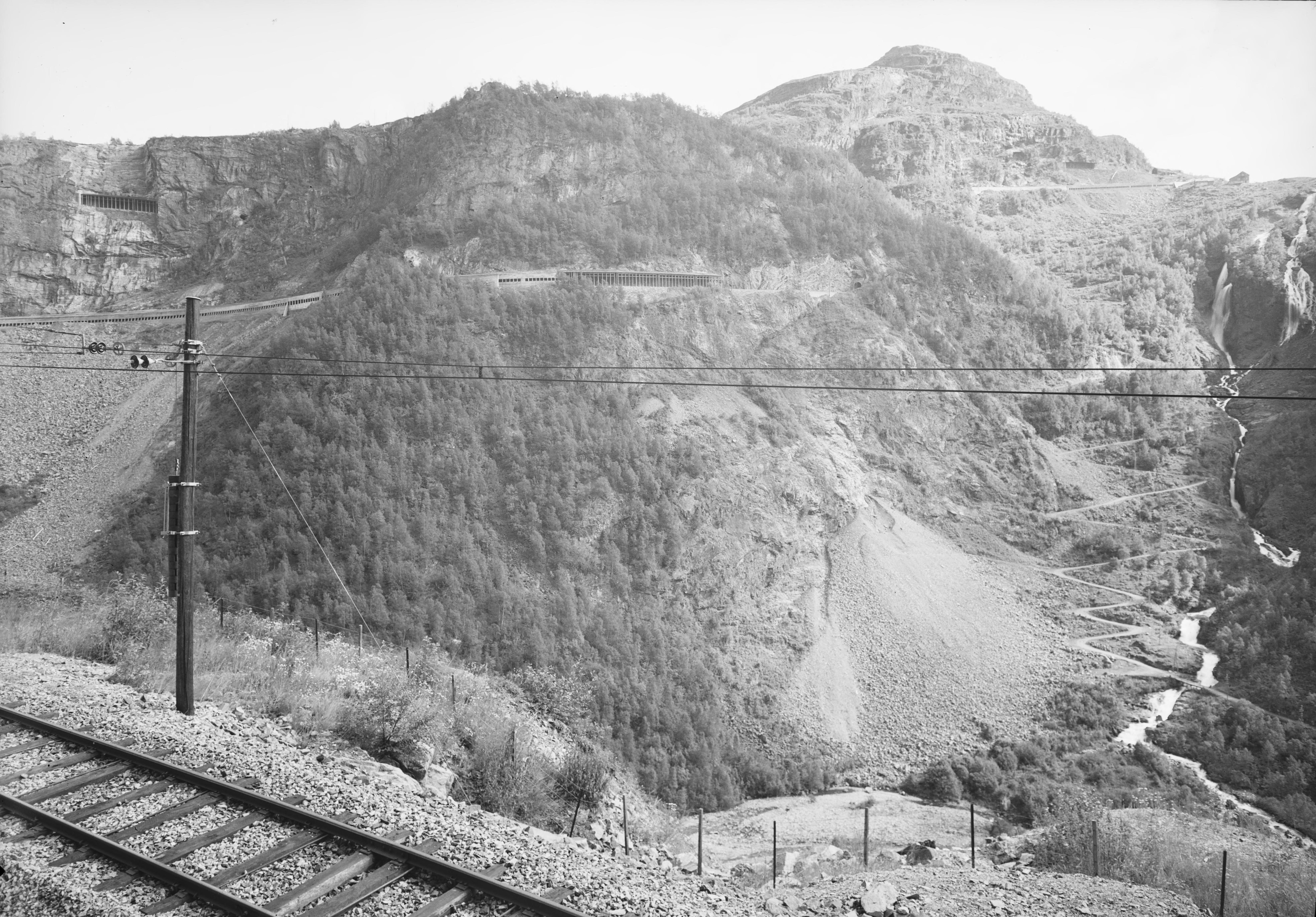 Bildet er hentet fra Nasjonalbibliotekets bildesamling. Anmerkninger til bildet var: Fotograf ukjent. Flåmsdalen,Vatnahalsen, Aurland, Sogn og Fjordane